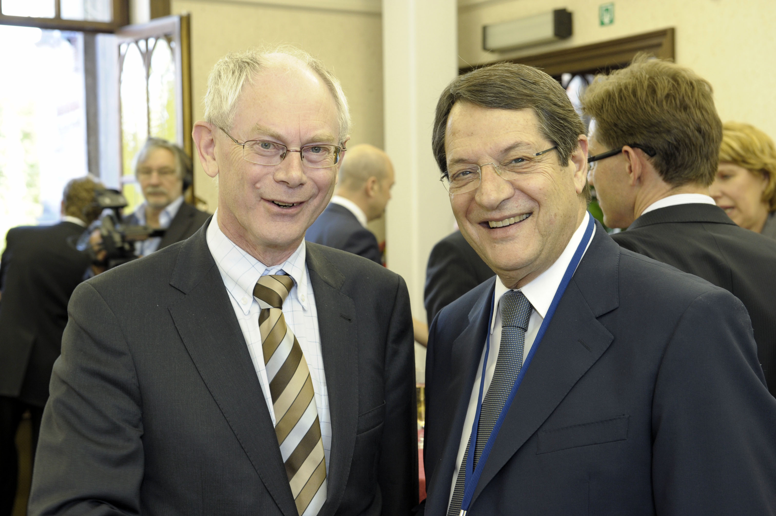 EPP Summit June 2010 (25)